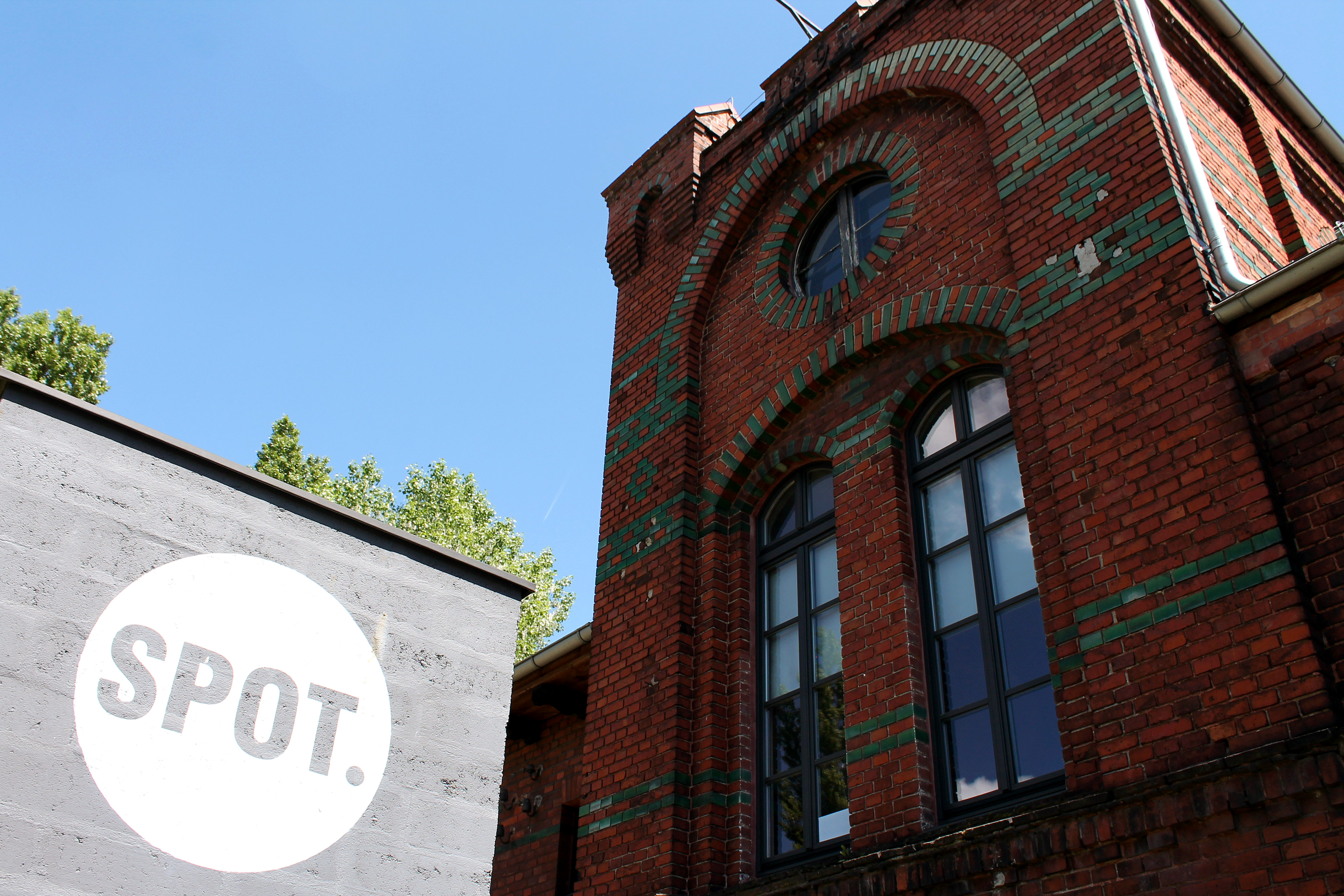 SPOT w zabytkowym budynku byłej elektrowni gminnej na Wildzie w Poznaniu, widok od frontu.